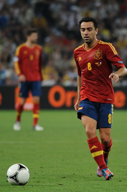 Xavi Hernández at Euro 2012 match Spain-France